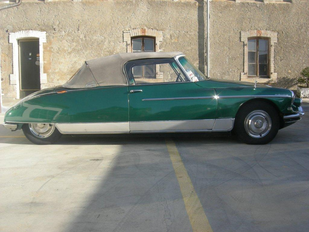 croisette DS 19 de 1961